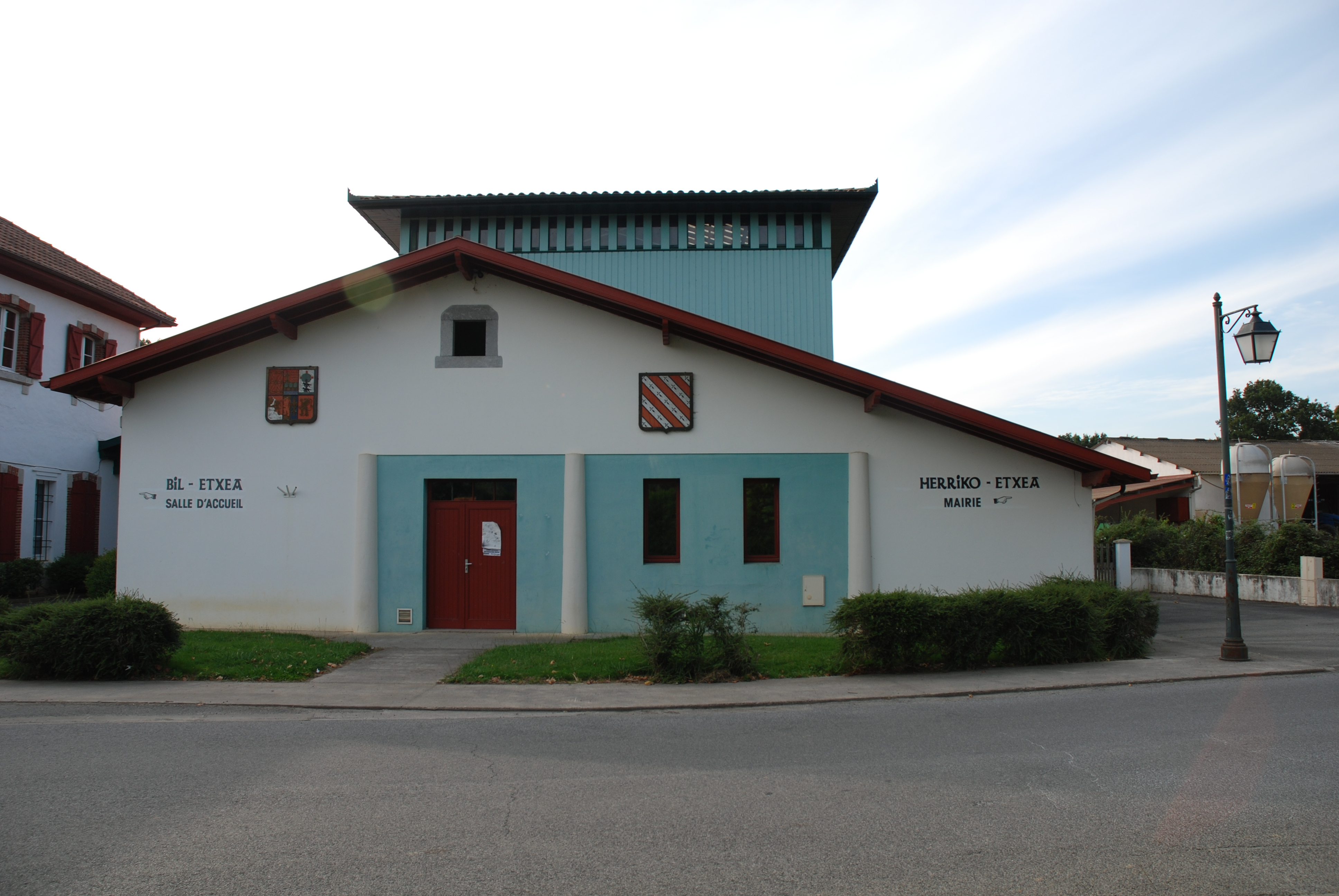 Saint-Martin-d'Arberoue, la mairie